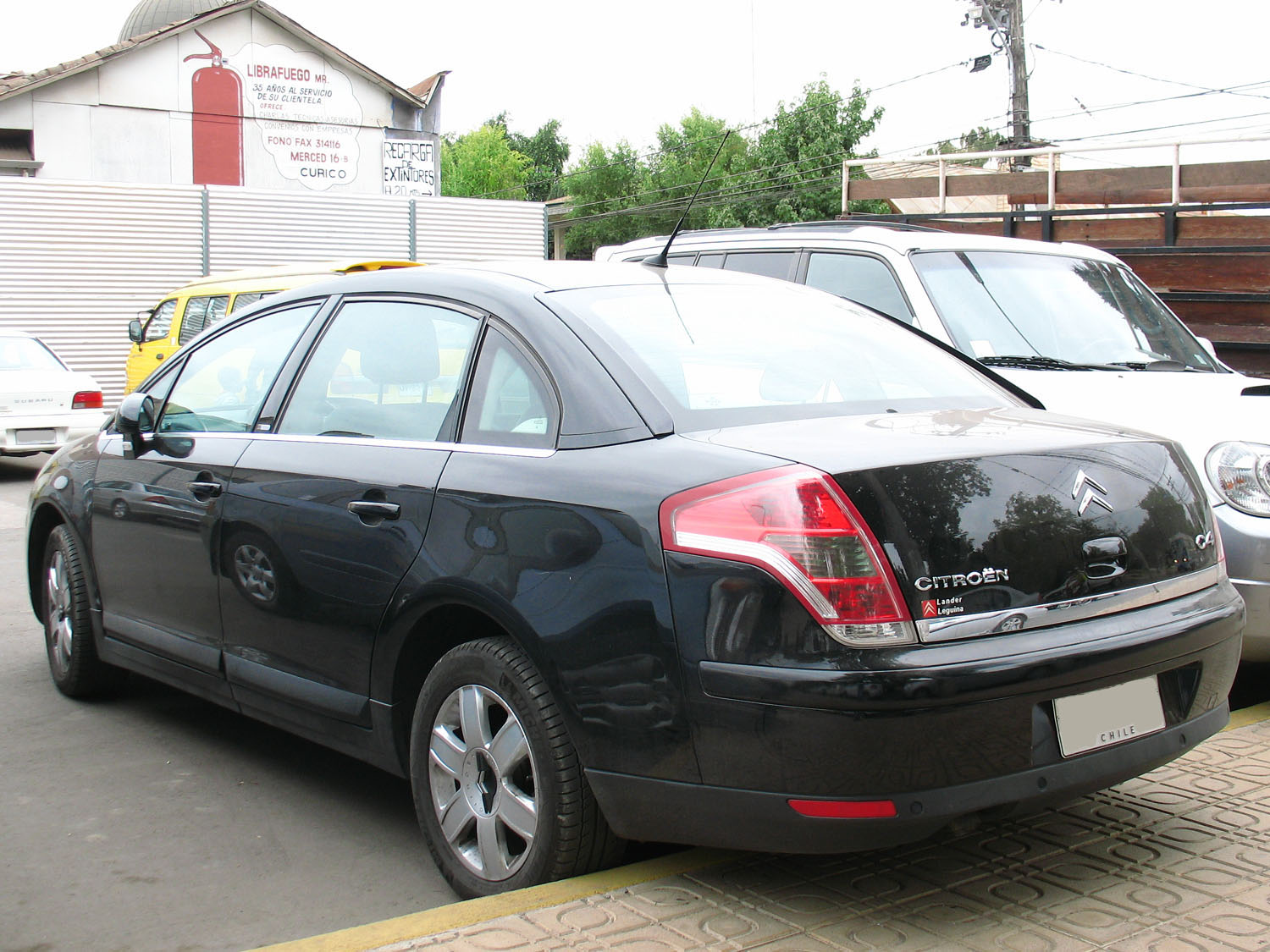 C4 sedan exec